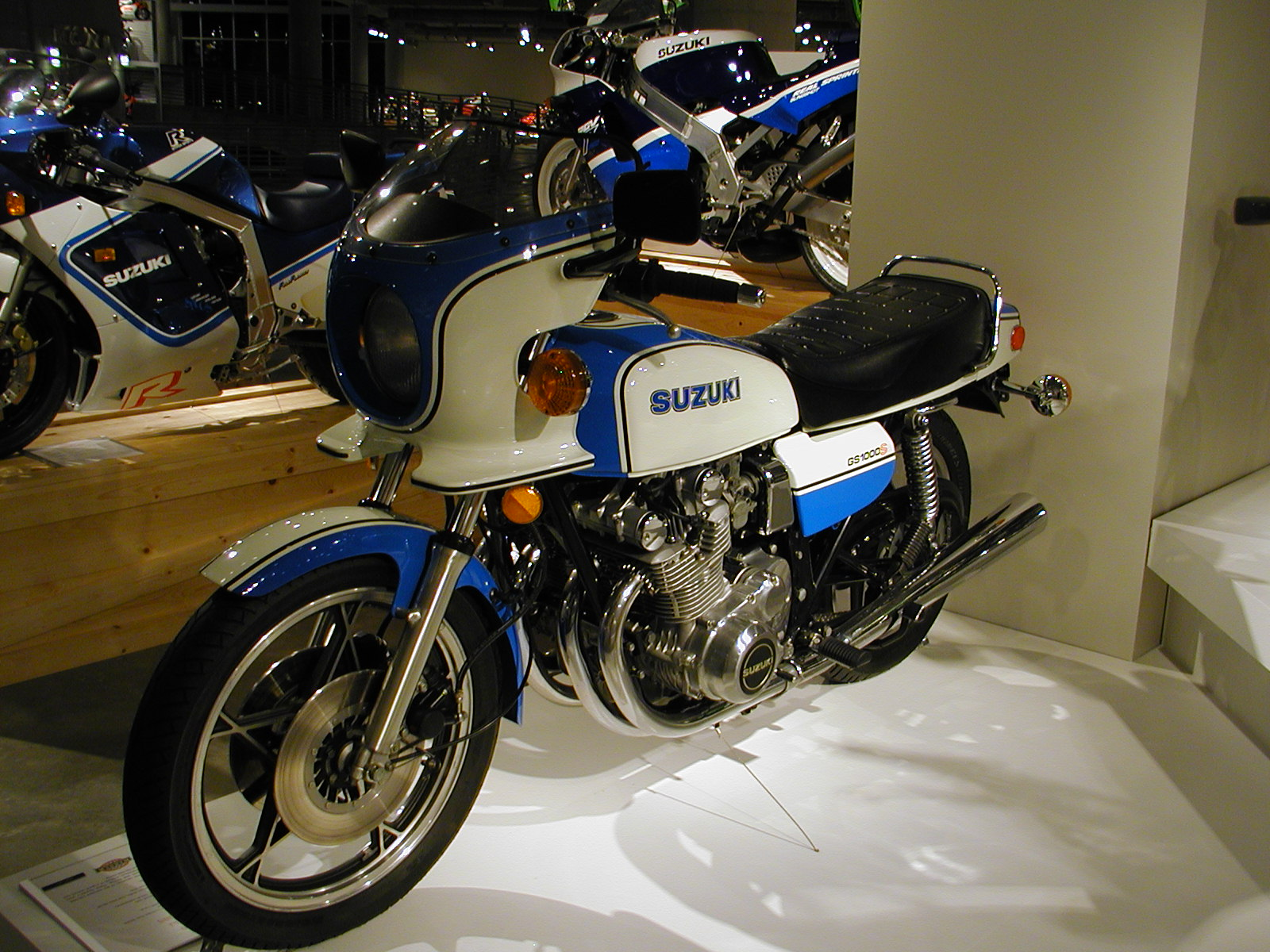 Barber Motorcycle Museum - Oct 22 2006 (91) Suzuki GS1000S